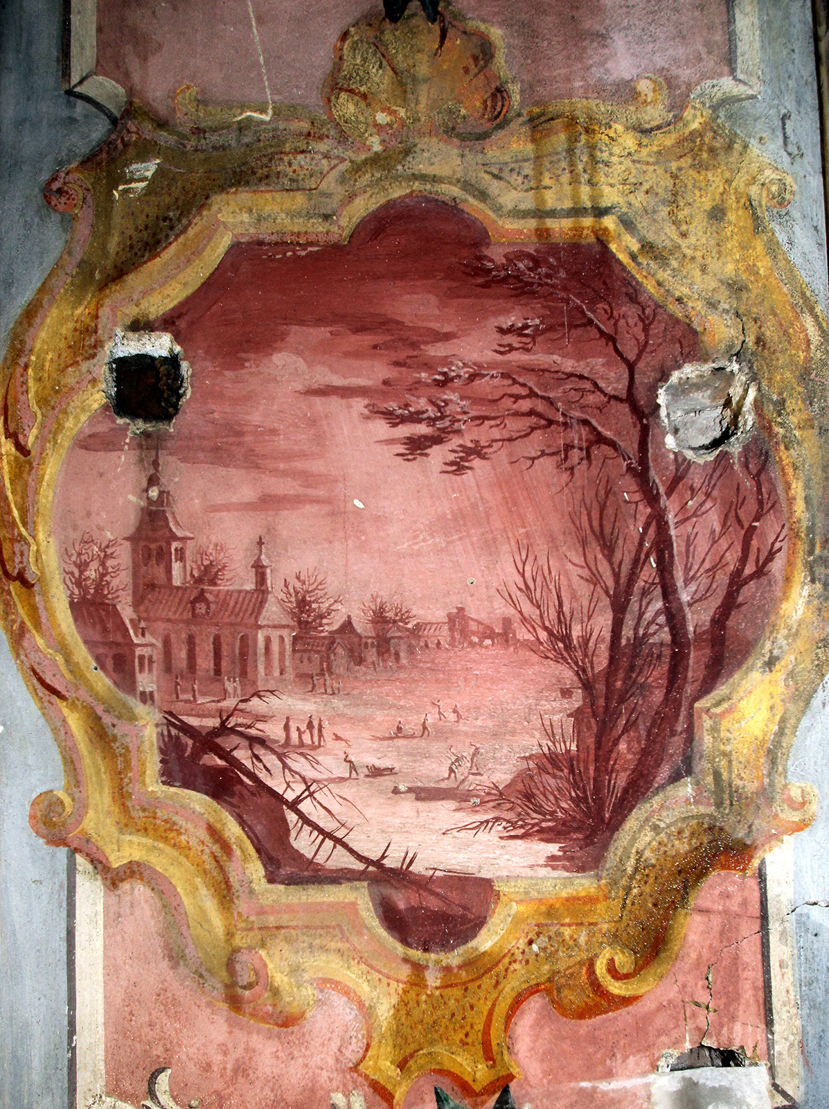 Gotha, Amtshaus, Details Fresko